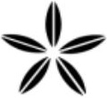 長岡大手高校の校章